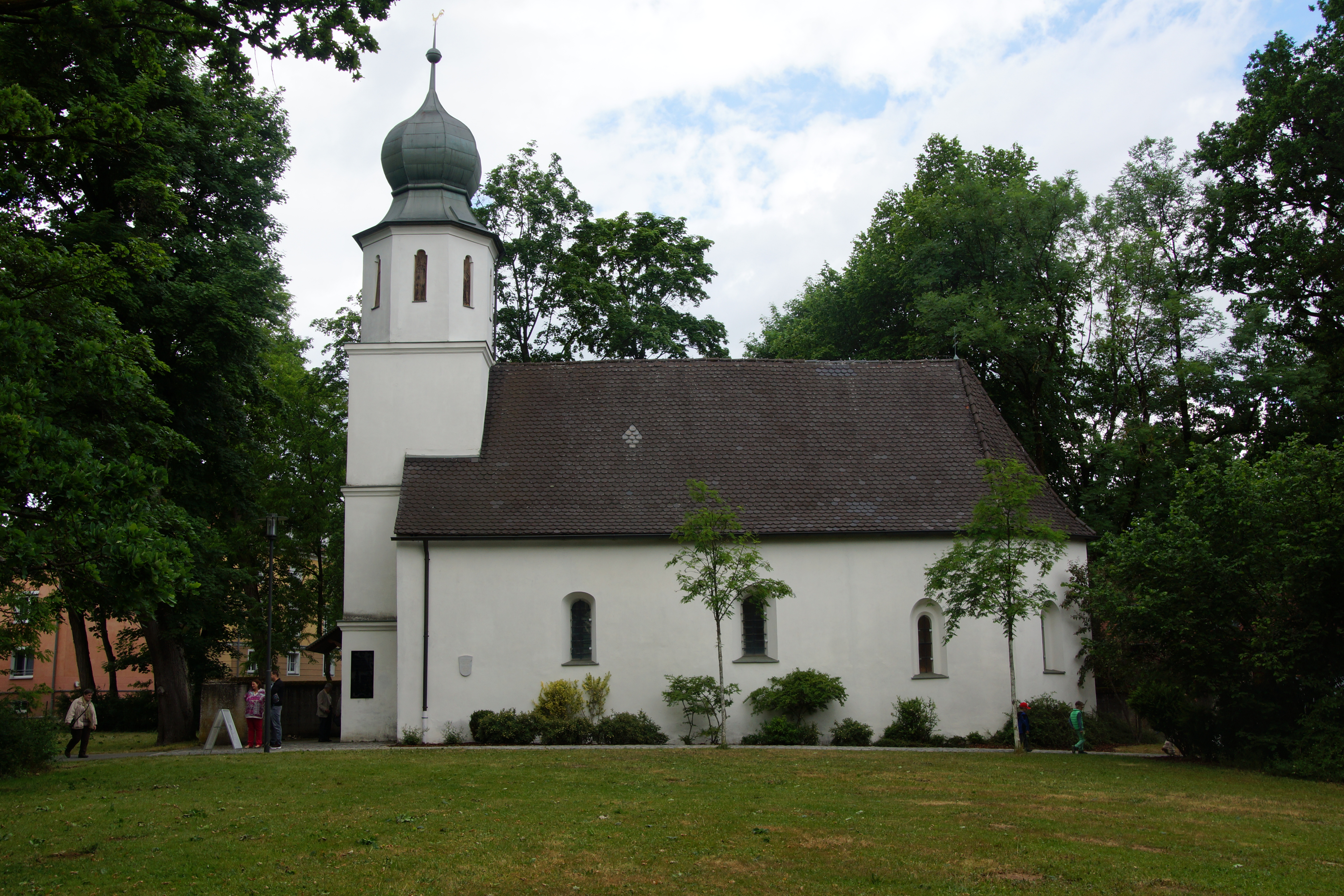 Schloßkirche / Schloßkapelle St. Margaretha in Woffenbach